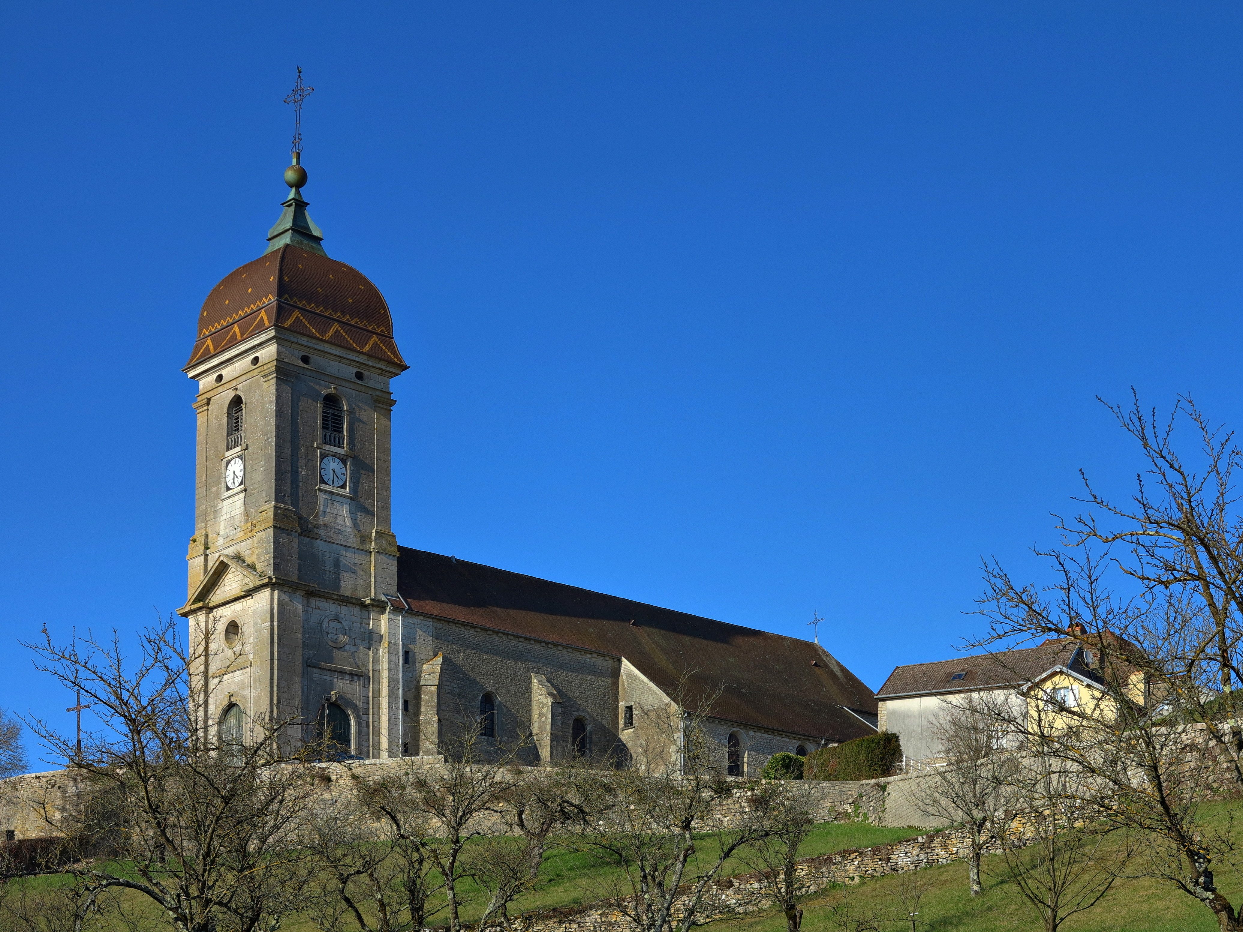 Inscrit aux monuments historiques sous le numéro PA00102126